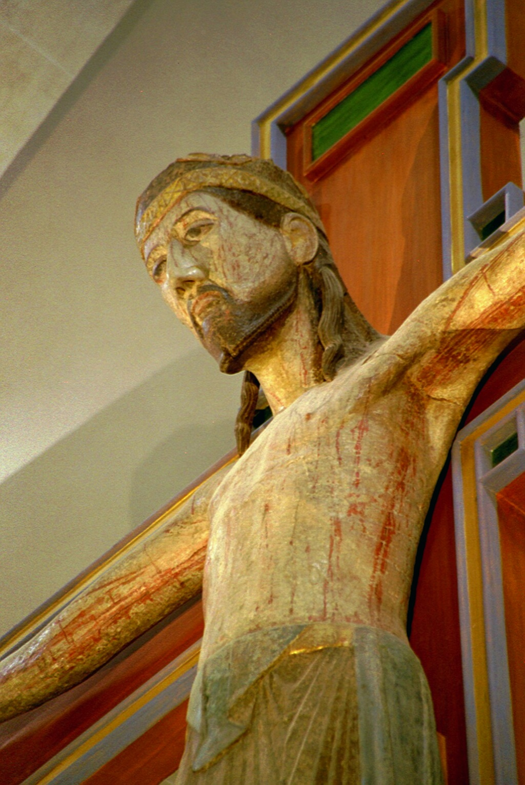 Romanischer Christus in der Basilika Altenstadt bei Schongau